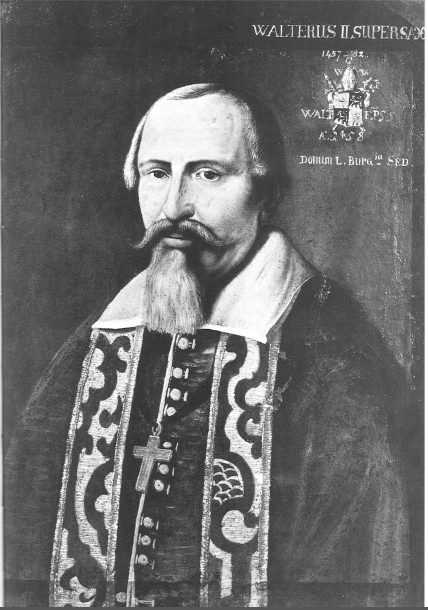 Une personnalité importante de l'histoire valaisanne du xvie siècle.